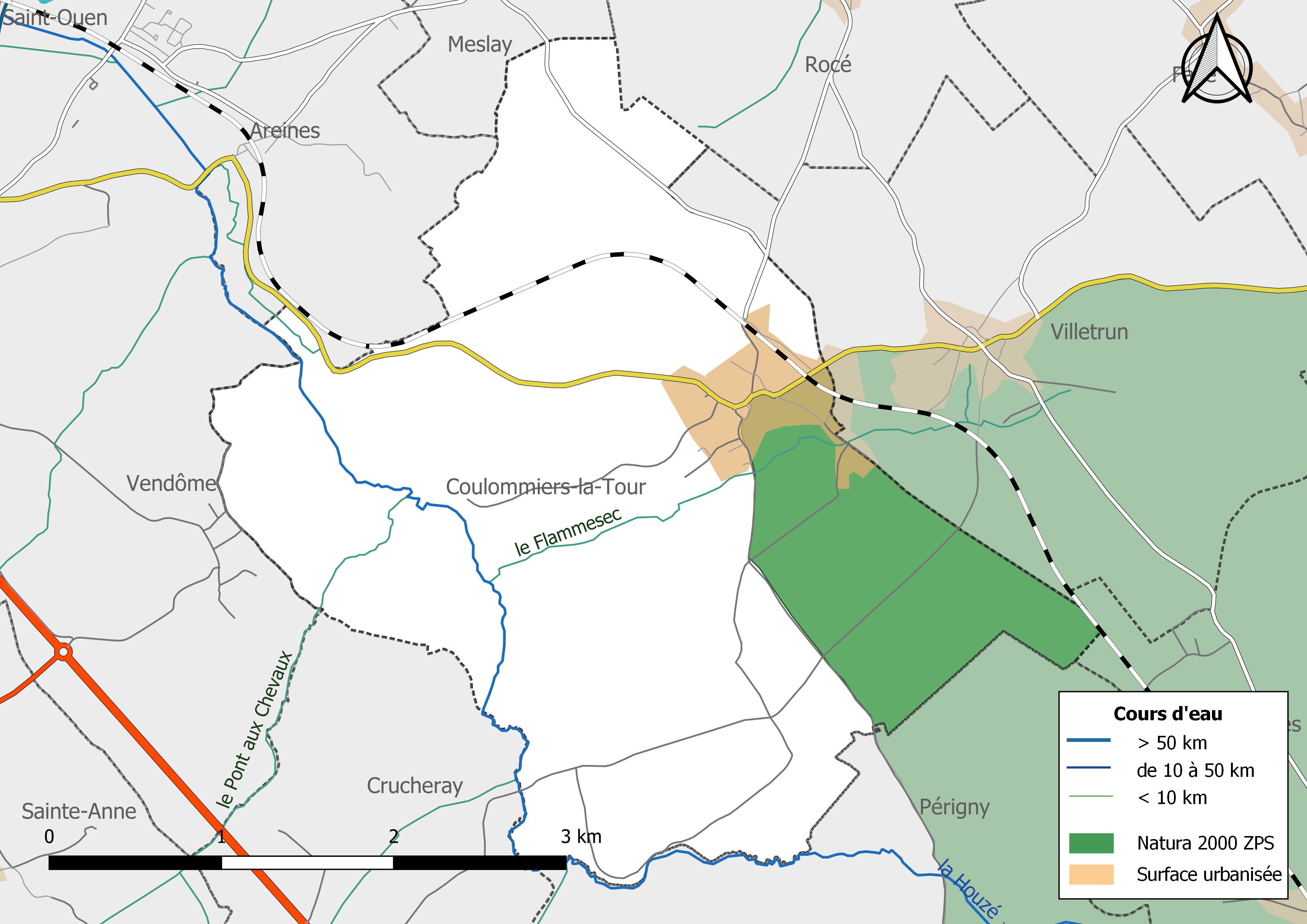 Carte du site Natura 2000 de type ZPS de la commune de Coulommiers-la-Tour (France).